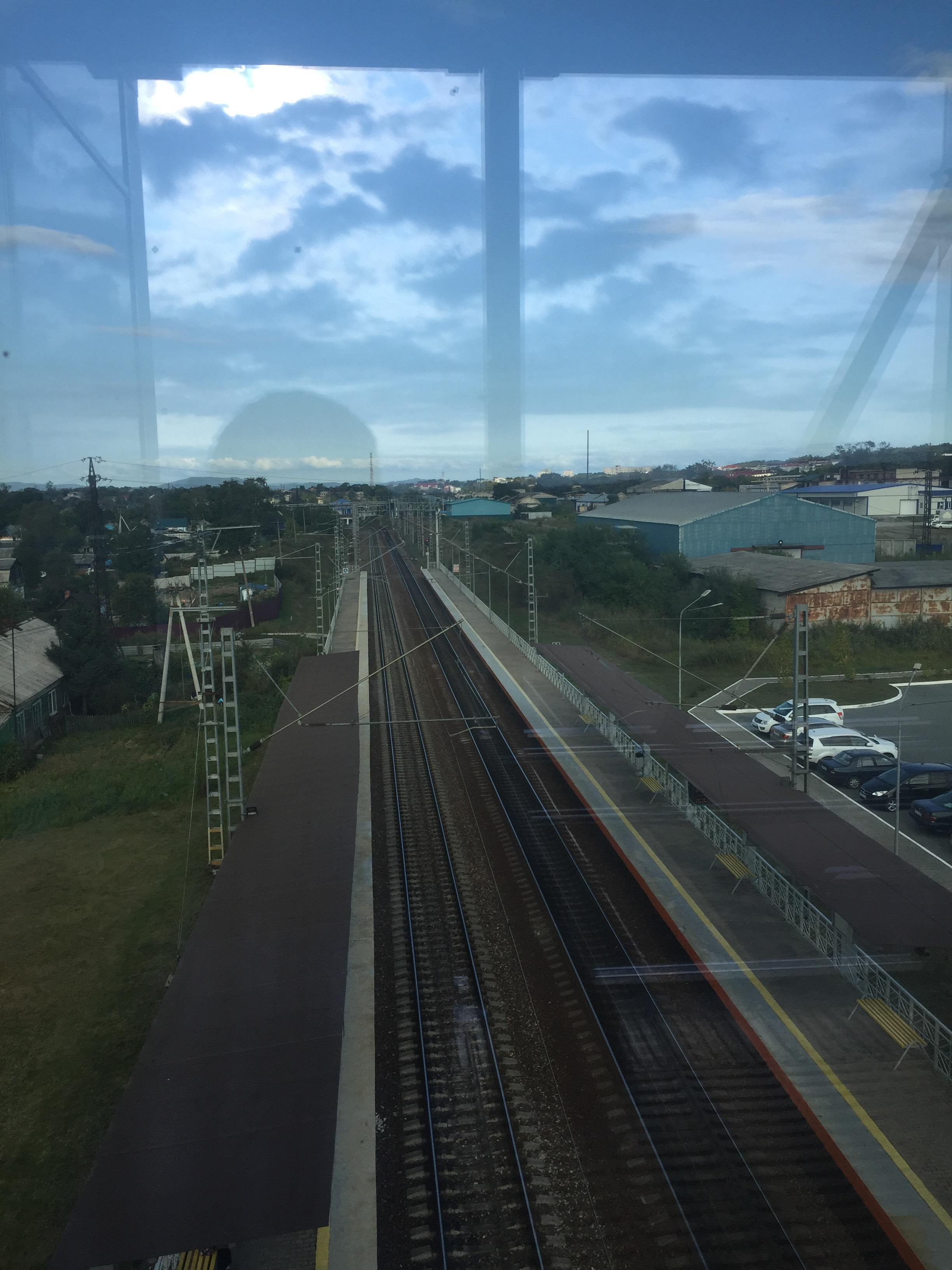 Остановочный пункт Артём Владивостокского отделения Дальневосточной железной дороги.